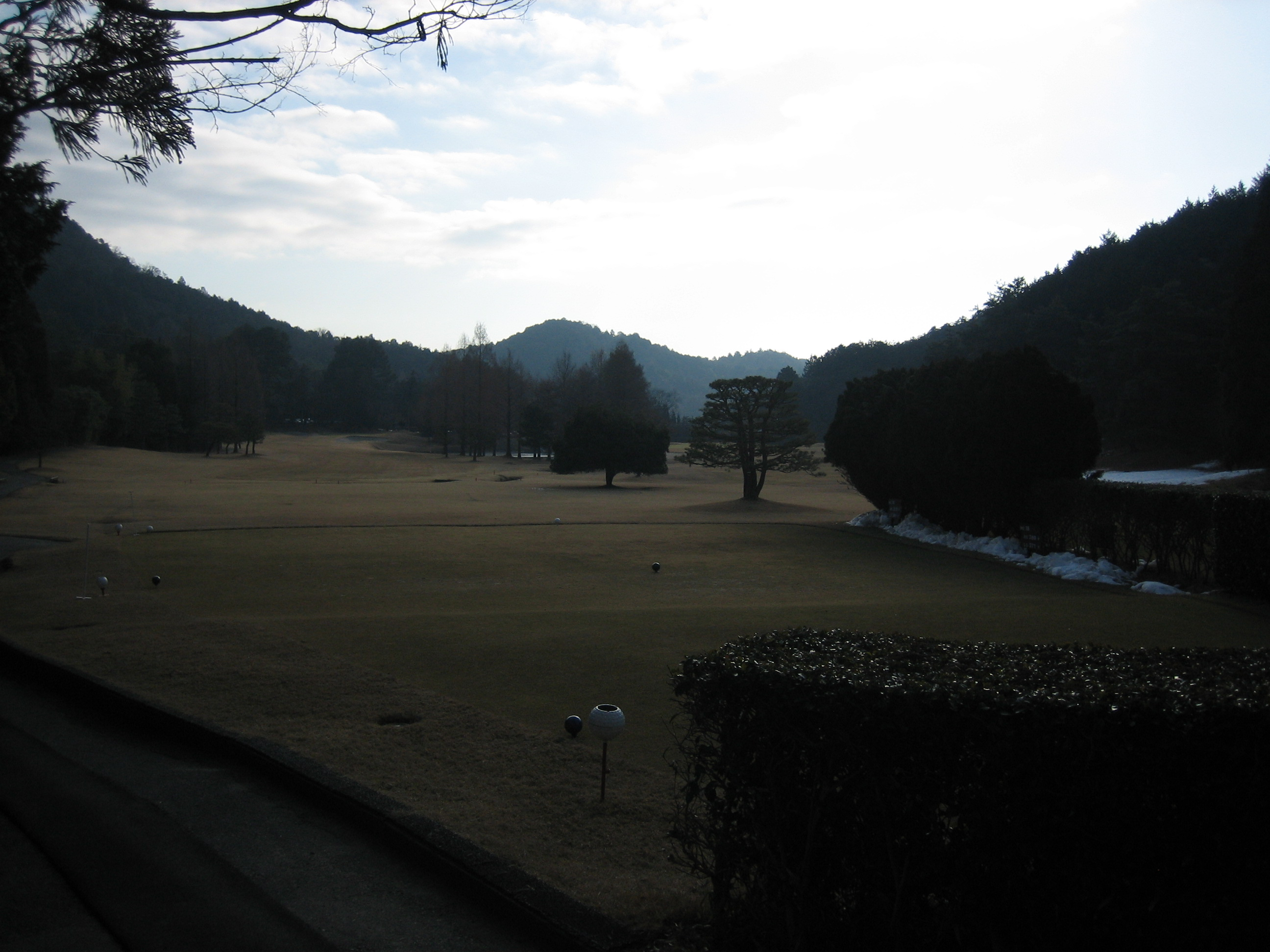 京都ゴルフ倶楽部上賀茂コース18番ホールを同ホールのティーインググラウンド脇から撮影